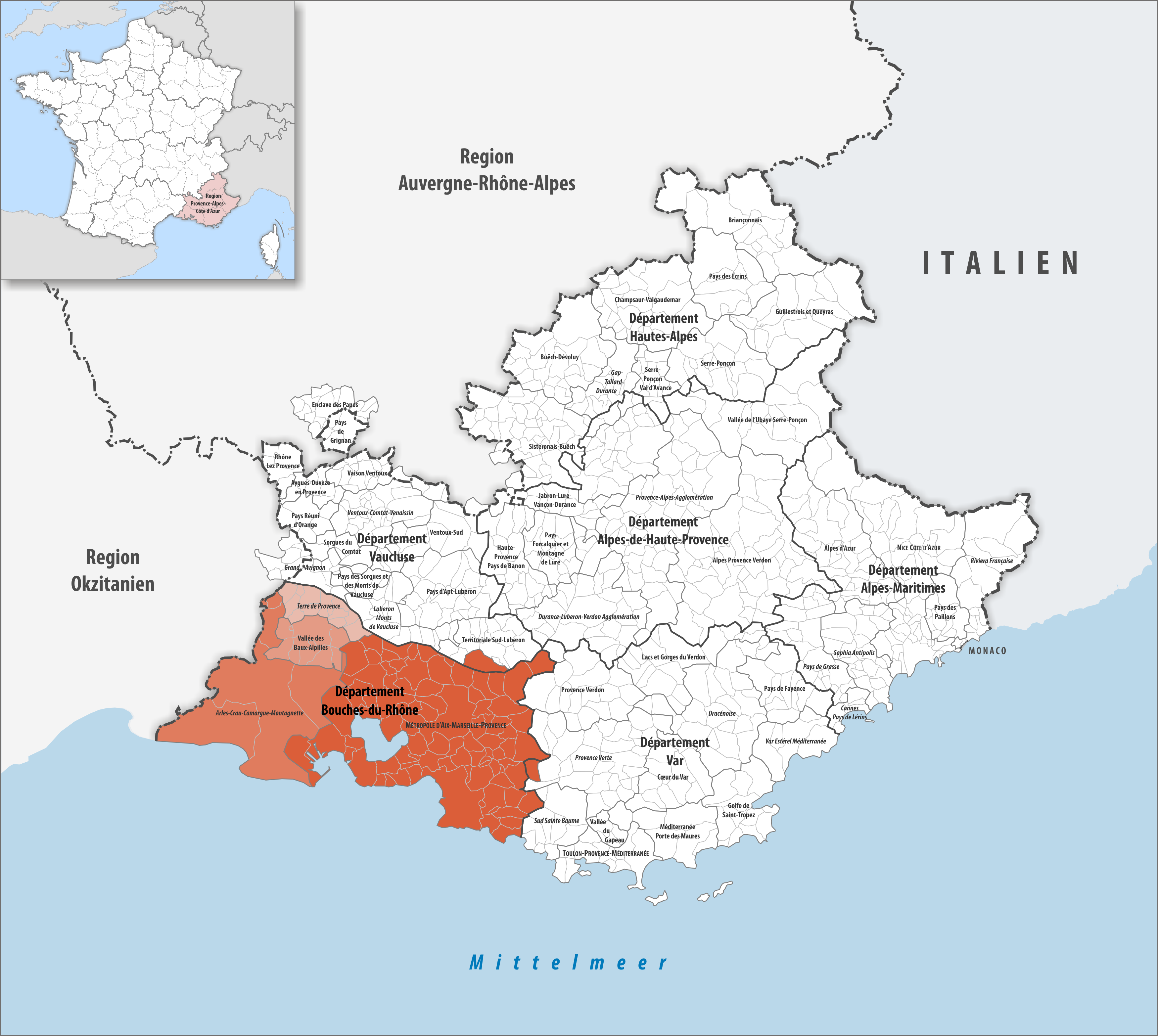 Gemeindeverbände im Département Bouches-du-Rhône